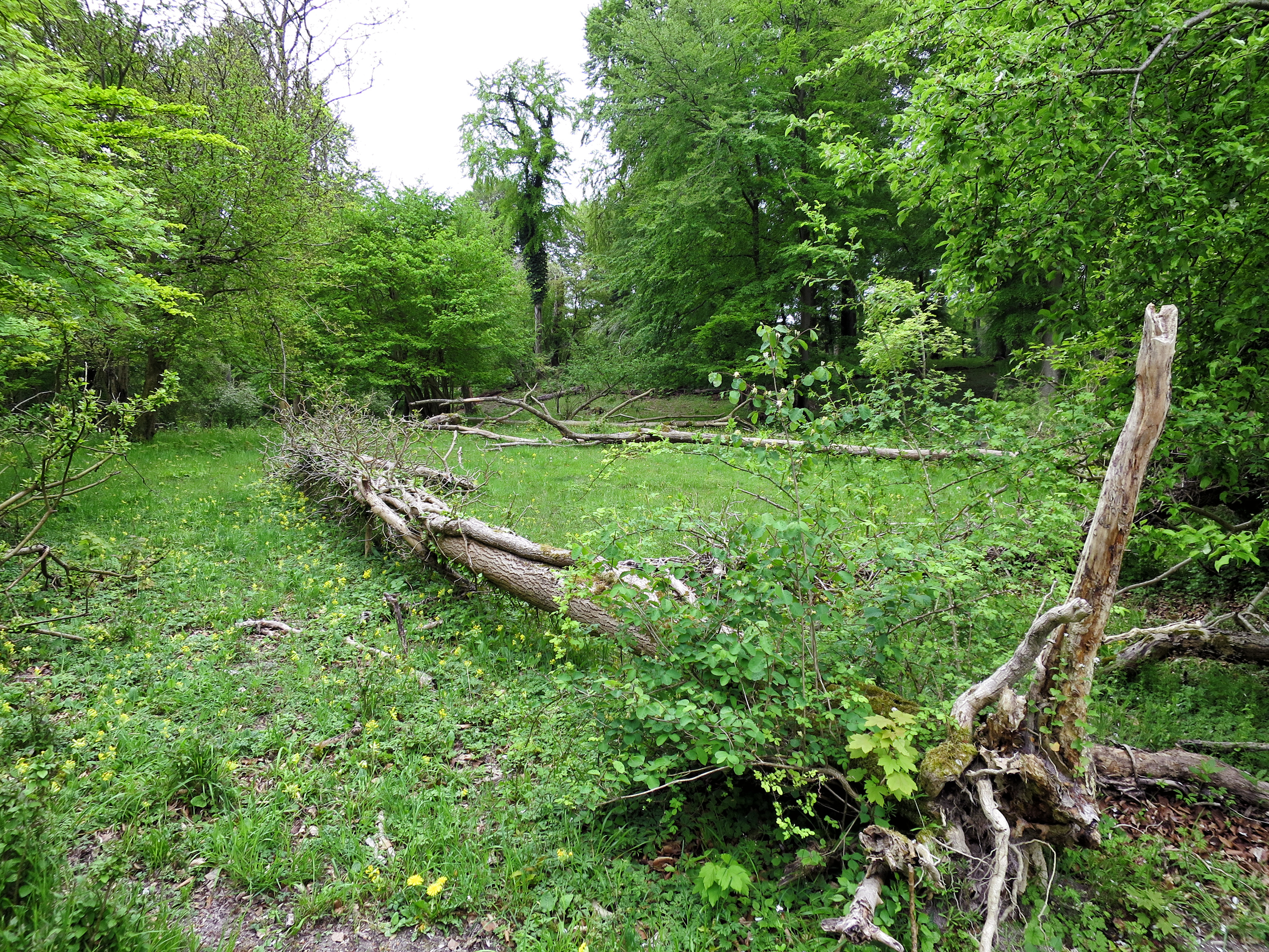 Døde træer får lov at ligge i Allindelille Fredskov til gavn for biodiversiteten.